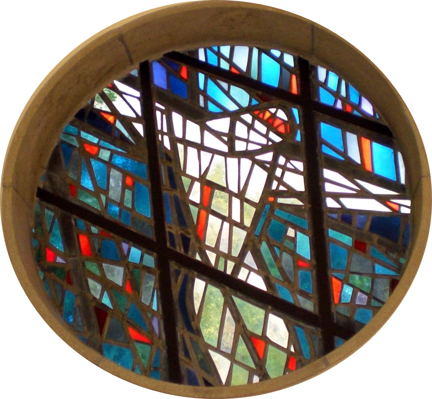 Günter Johl, "Der gekreuzigte Christus" (1960), Rundfenster für die Dorfkirche in Gorgast.